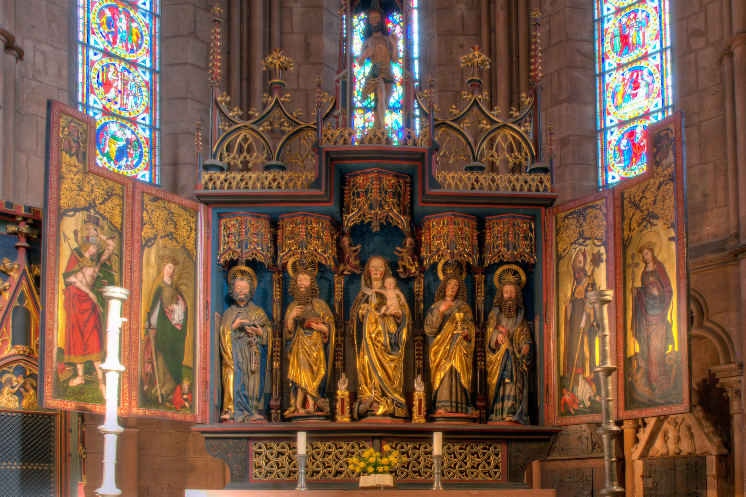 Marienaltar im Chor der Marienkirche in Gelnhausen. Der Hochaltar ist signiert: "1500 Nikolaus Schit". Im Inneren des Schreins stehen fünf große, goldene geschnitzte Figuren. Von links: Petrus, Johannes der Täufer, Maria, Johannes der Evangelist und Paulus. Die Flügel zeigen auf Goldgrund gemalte Heilige.